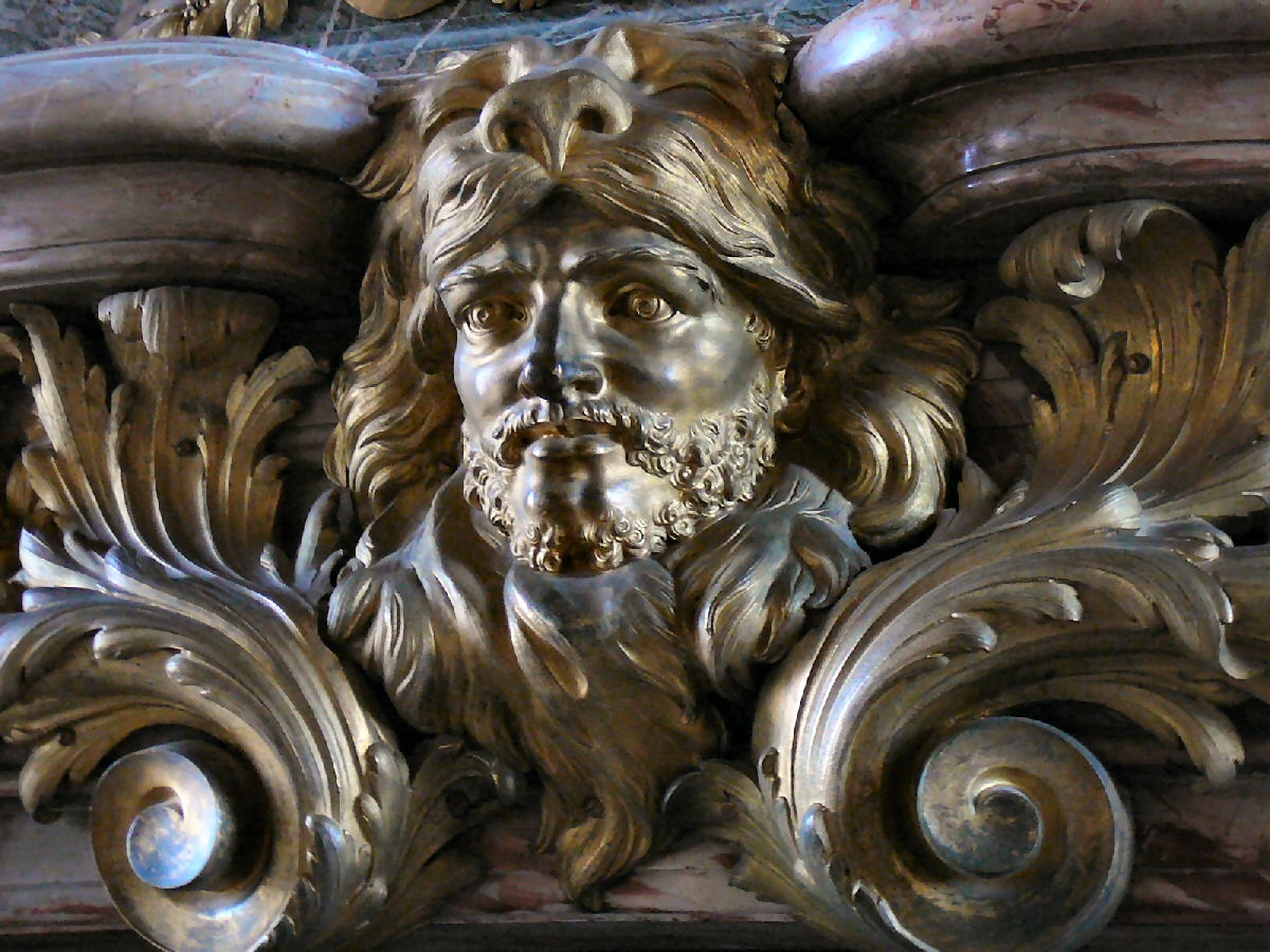 Antoine Vassé: Détail de la cheminée du salon d'Hercule. /detail of the salon d'Hercule's fireplace. Château de Versailles, Yvelines, Ile de France, France.